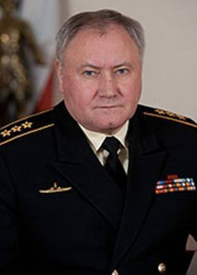 Командующий Северным флотом адмирал Королёв Владимир Иванович